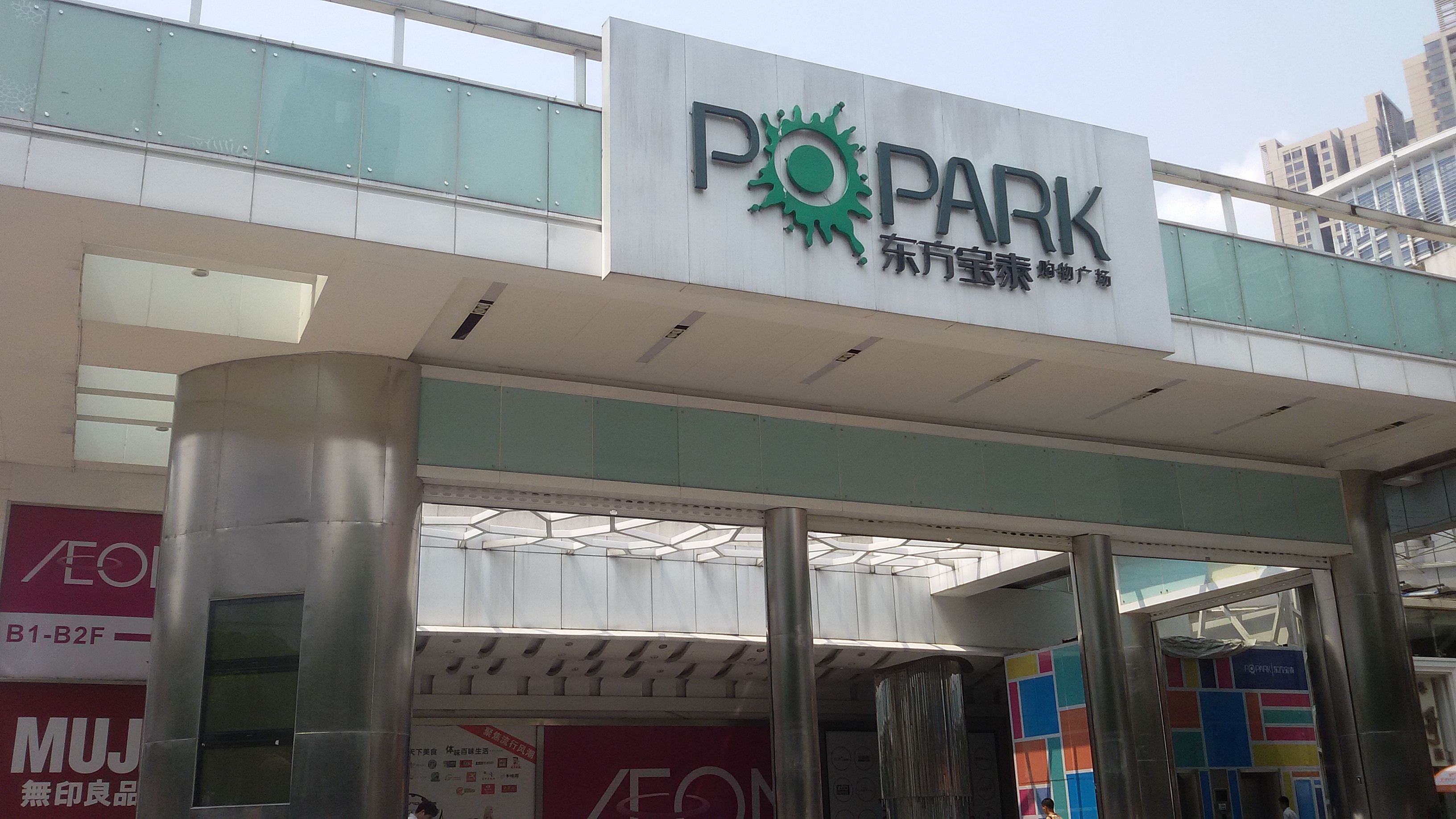 粵語: 東方寶泰購物廣場